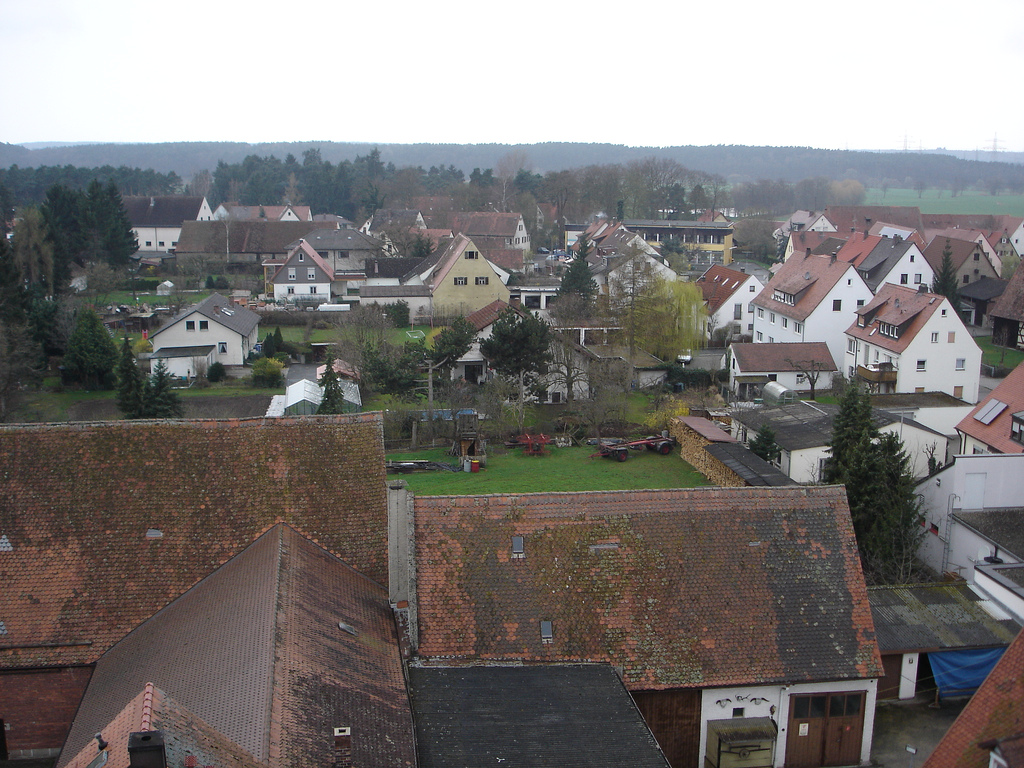 Eltersdorf: Blick von der Egidienstraße nach Westen, rechts hinten Ecke Eltersdorfer Straße / Webichgasse